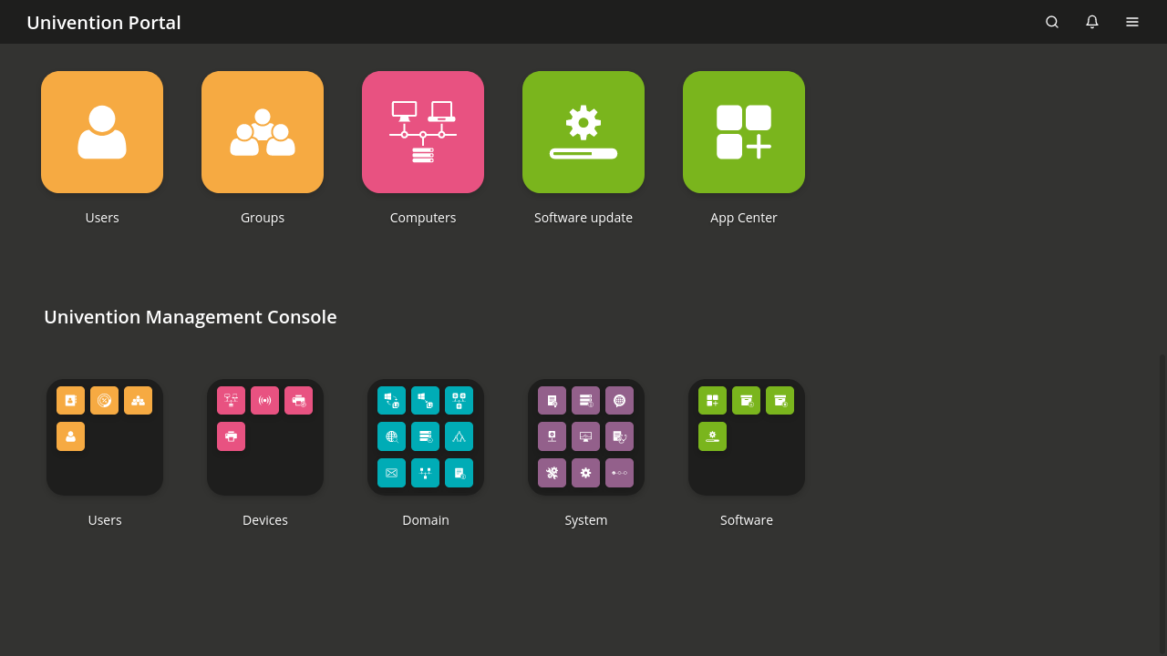 Screenshot of the Univention Management Console, the web-based management interface of the Open Source server operating system Univention Corporate Server/Favorites view